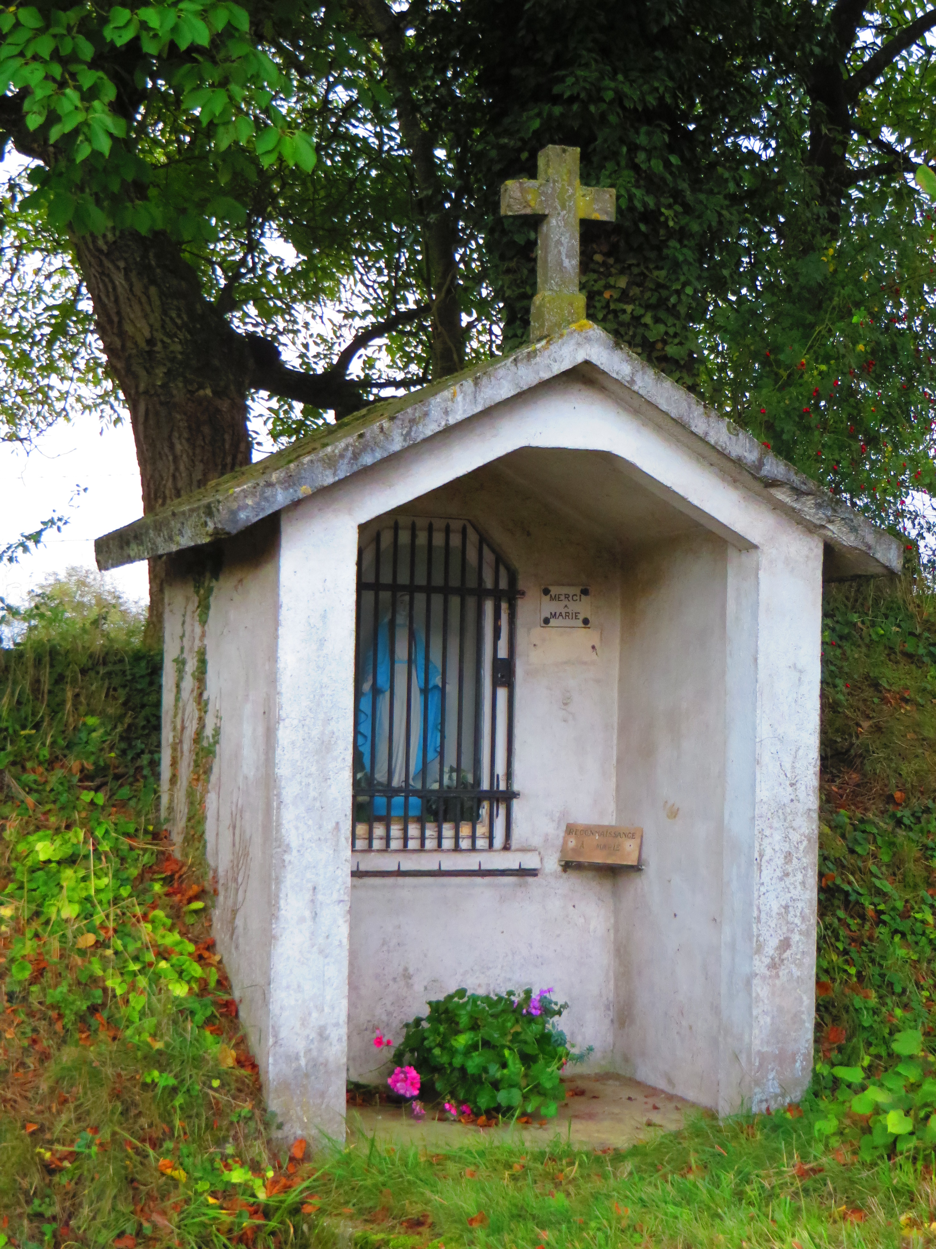 Domnom-lès-Dieuze oratoire